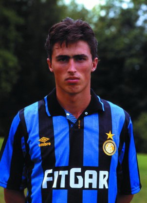 Dino Baggio nel 1991 con la maglia dell'Inter. Licensing Categoria:Immagini di Dino Baggio